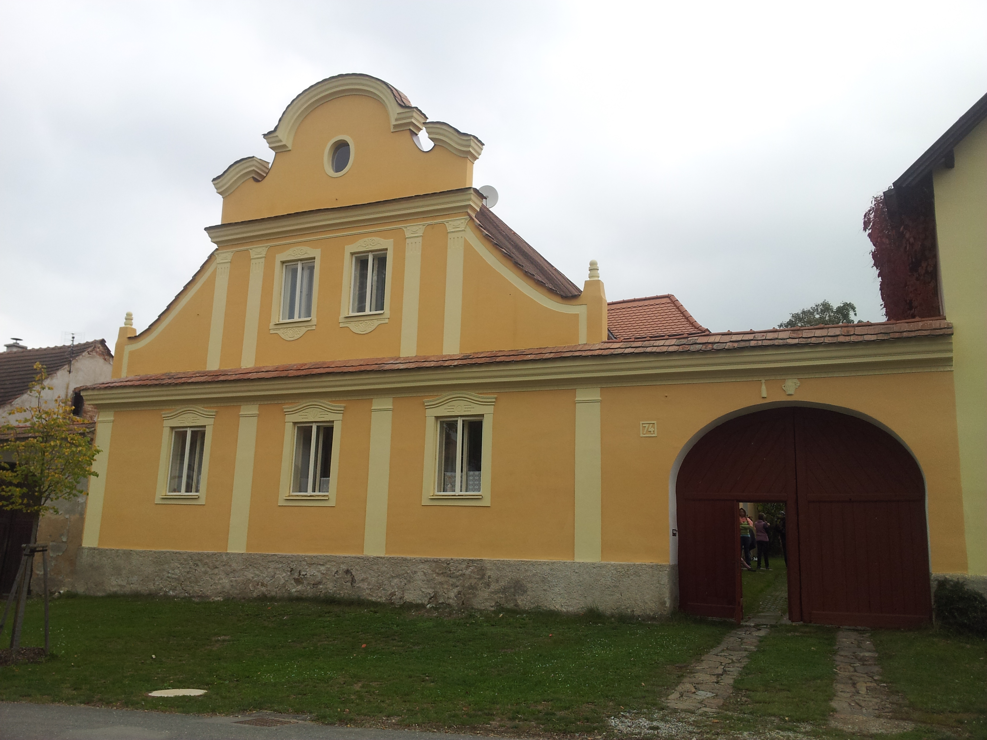 Usedlost čp. 74, Senožaty 74, Senožaty.